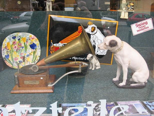 Nipper (His Master's Voice), Schaufenster in Berlin